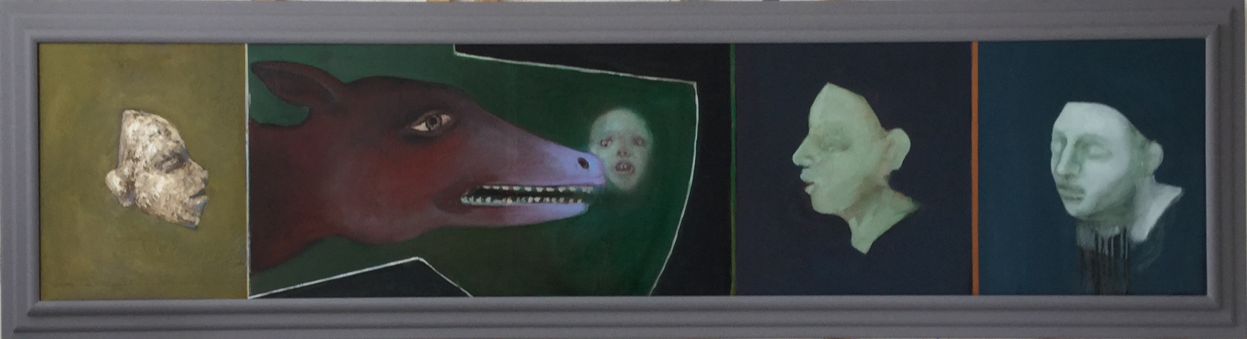 Maleri av den norske maleren Bjørn Krogstad: Barnets drøm. Olje på lerret 2018